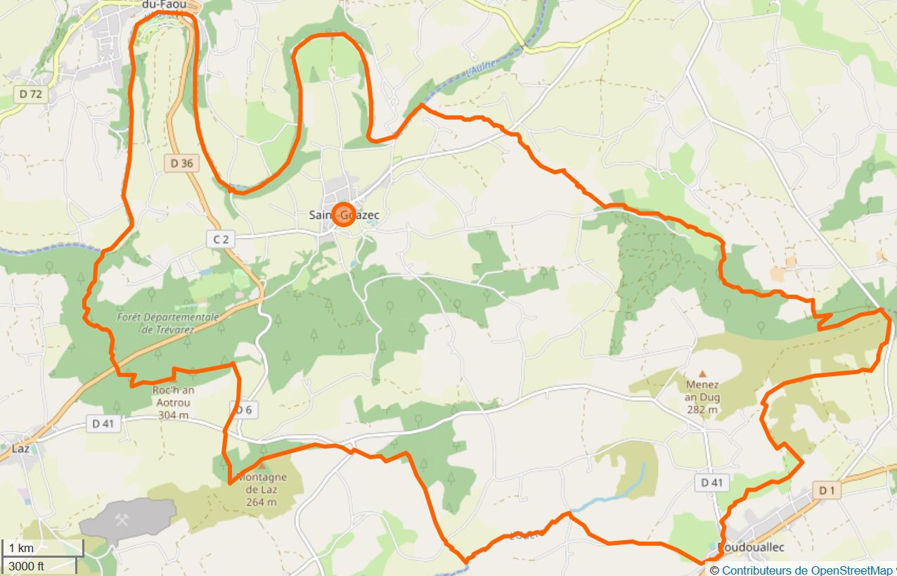 Cette carte a été créée à partir des données du projet Openstreetmap. This map may be incomplete, and may contain errors. Don't rely solely on it for navigation.